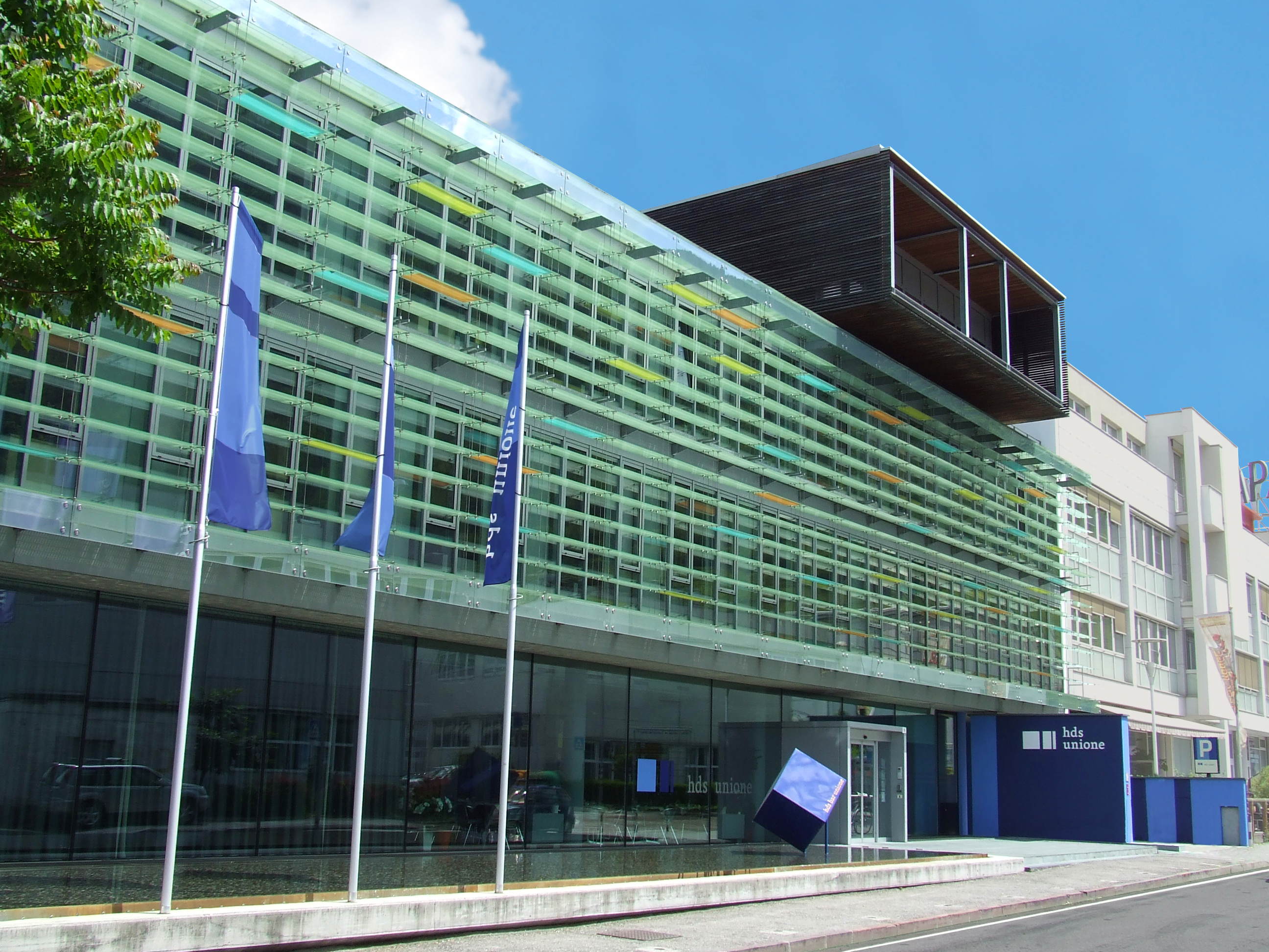 Foto della sede di Bolzano dell'Unione commercio turismo servizi Alto Adige